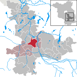 Krausnick-Groß Wasserburg in Brandenburg (Country) - District Dahme-Spreewald